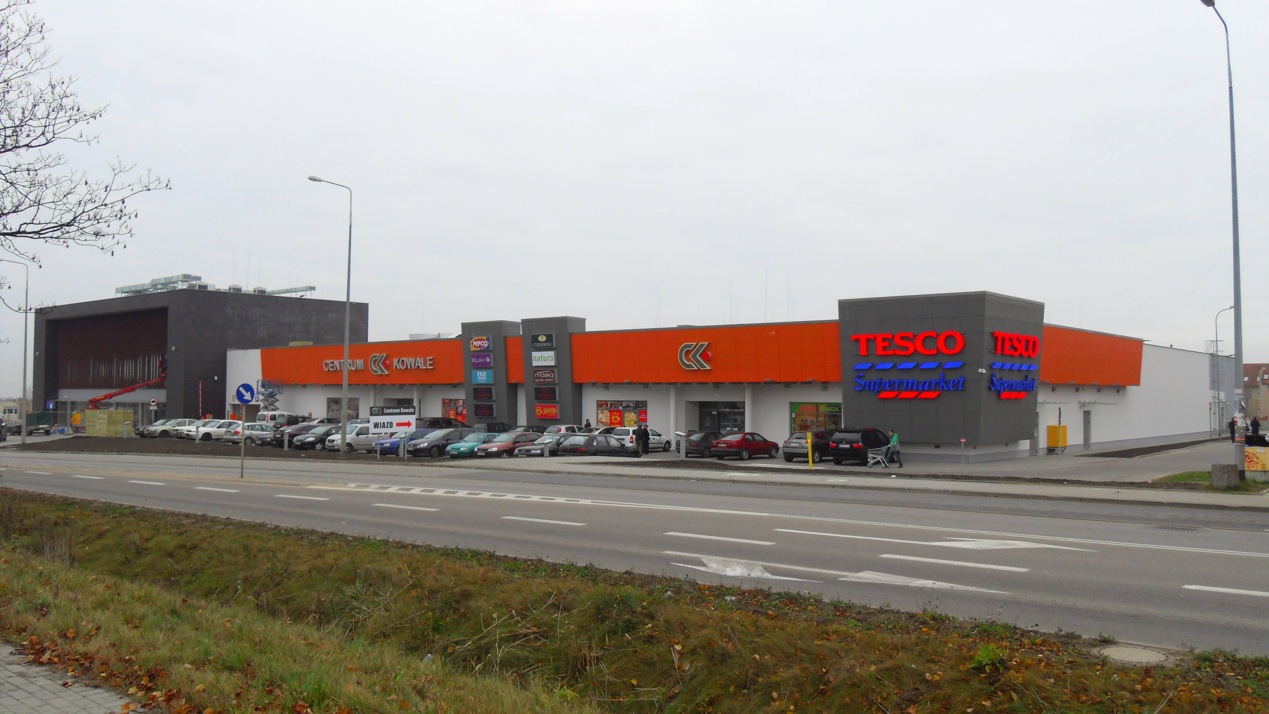 Kowale (powiat gdański). "Centrum Kowale", ul. Staropolska.